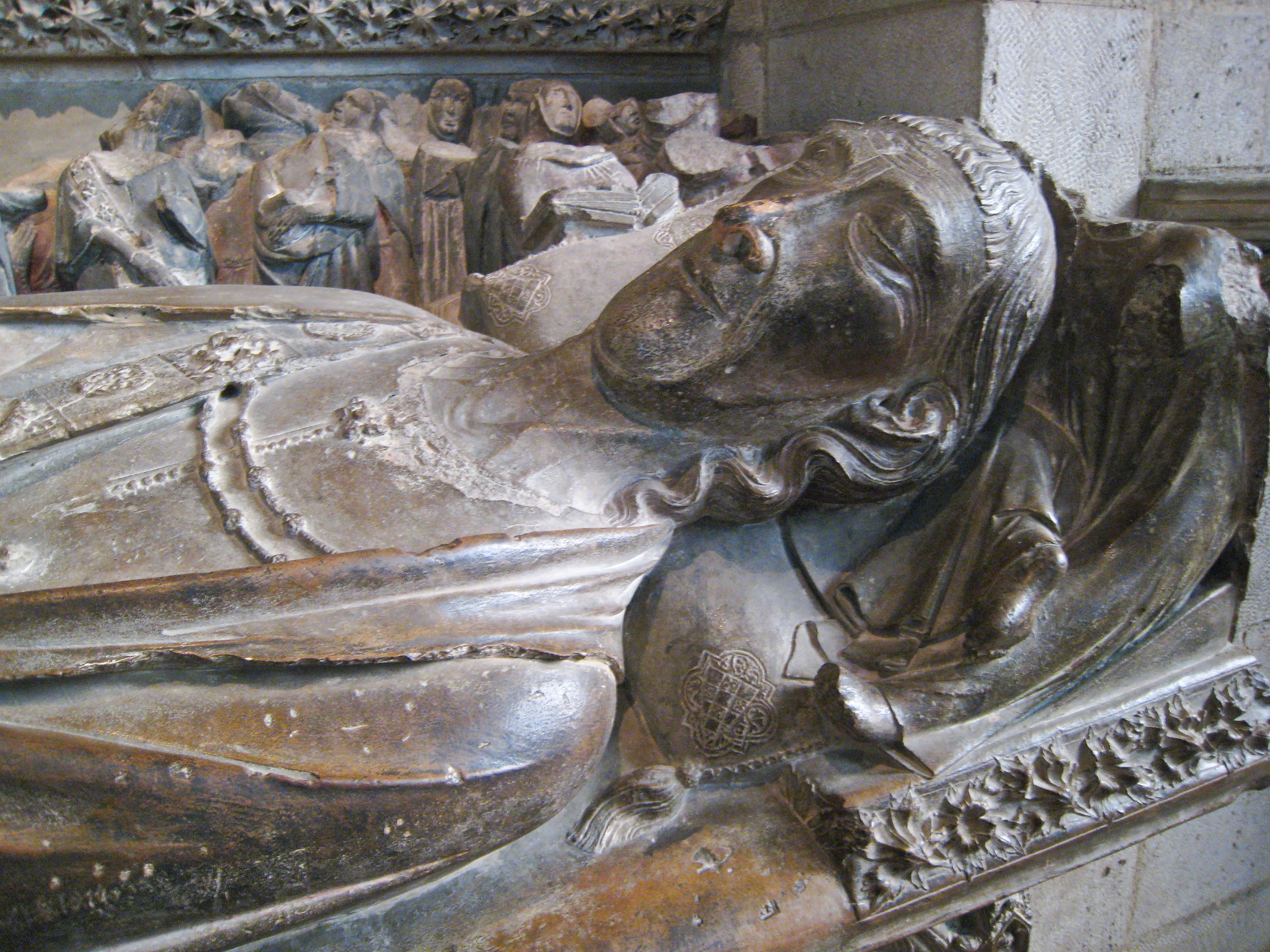 Sepulcre d'Ermengol X, comte d'Urgell (c. 1254-1314). El sepulcre es troba al museu The Cloisters a Nova York.